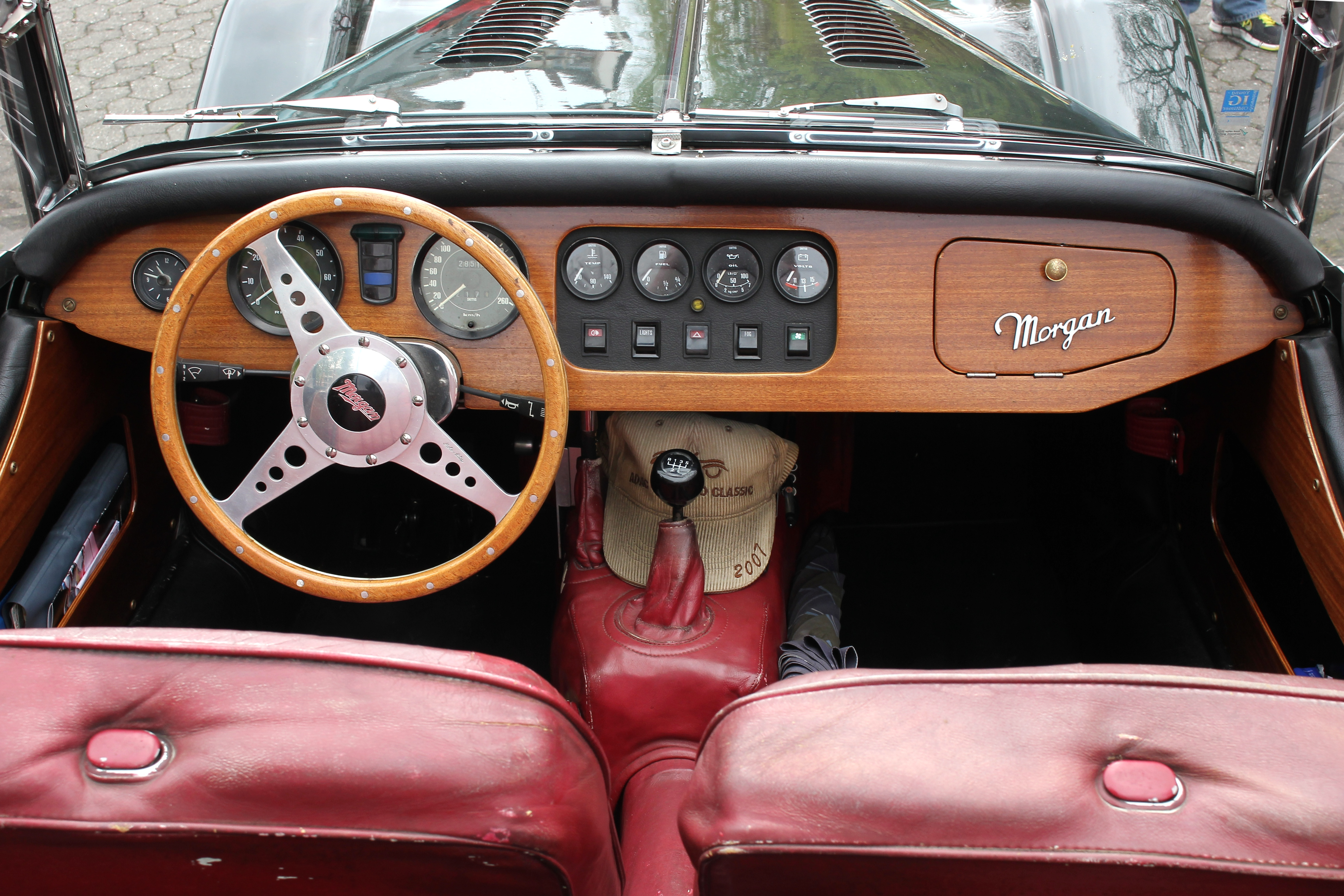 Armaturenbrett eine Morgan Plus 8, Ausführung ab 1977 (abgebildetes Fahrzeug Baujahr 1984)